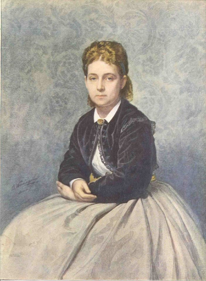 Александра Николаевна Якоби